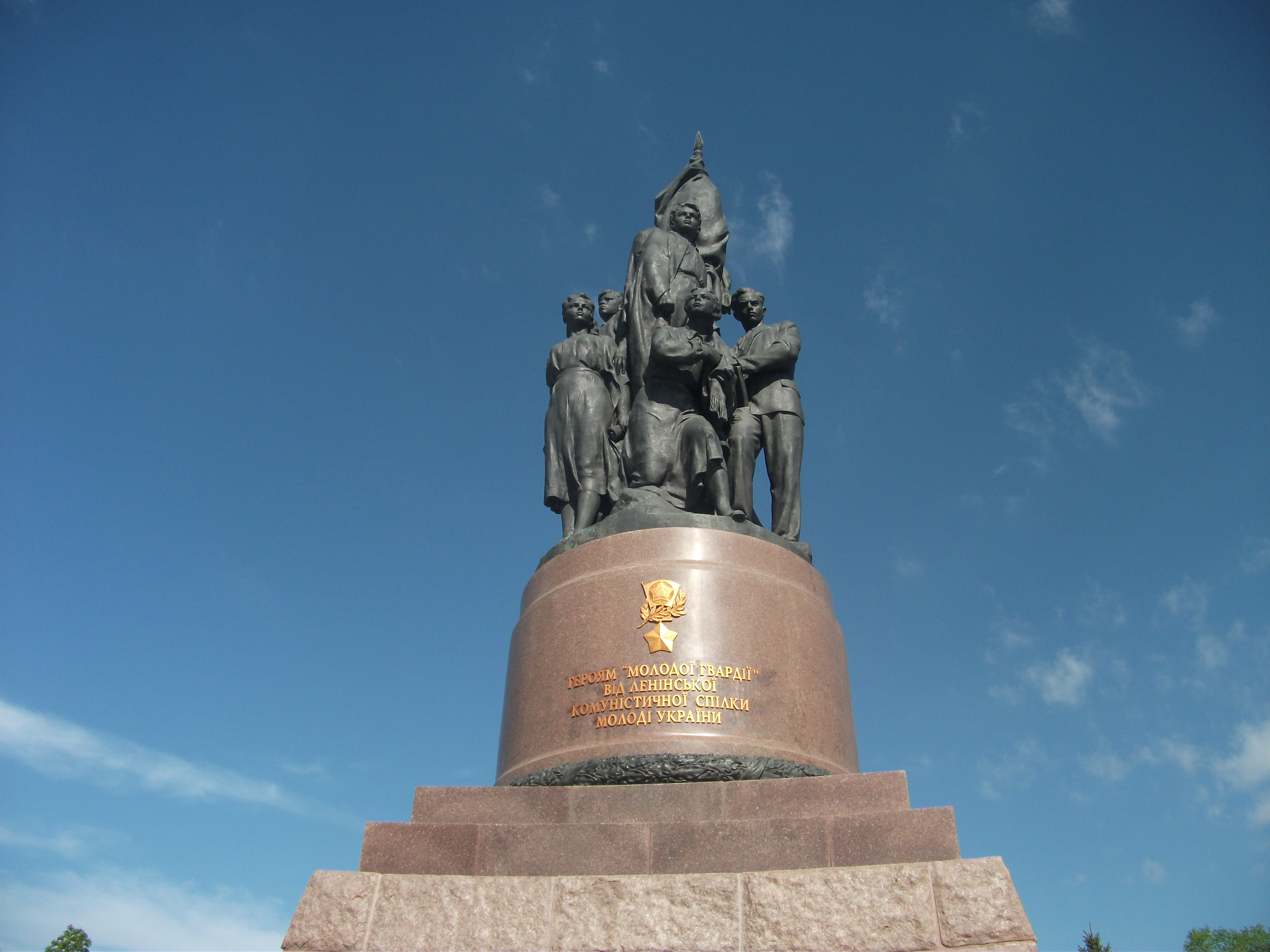 Памятник посвящён подпольной антифашистской организации "Молодая гвардия"